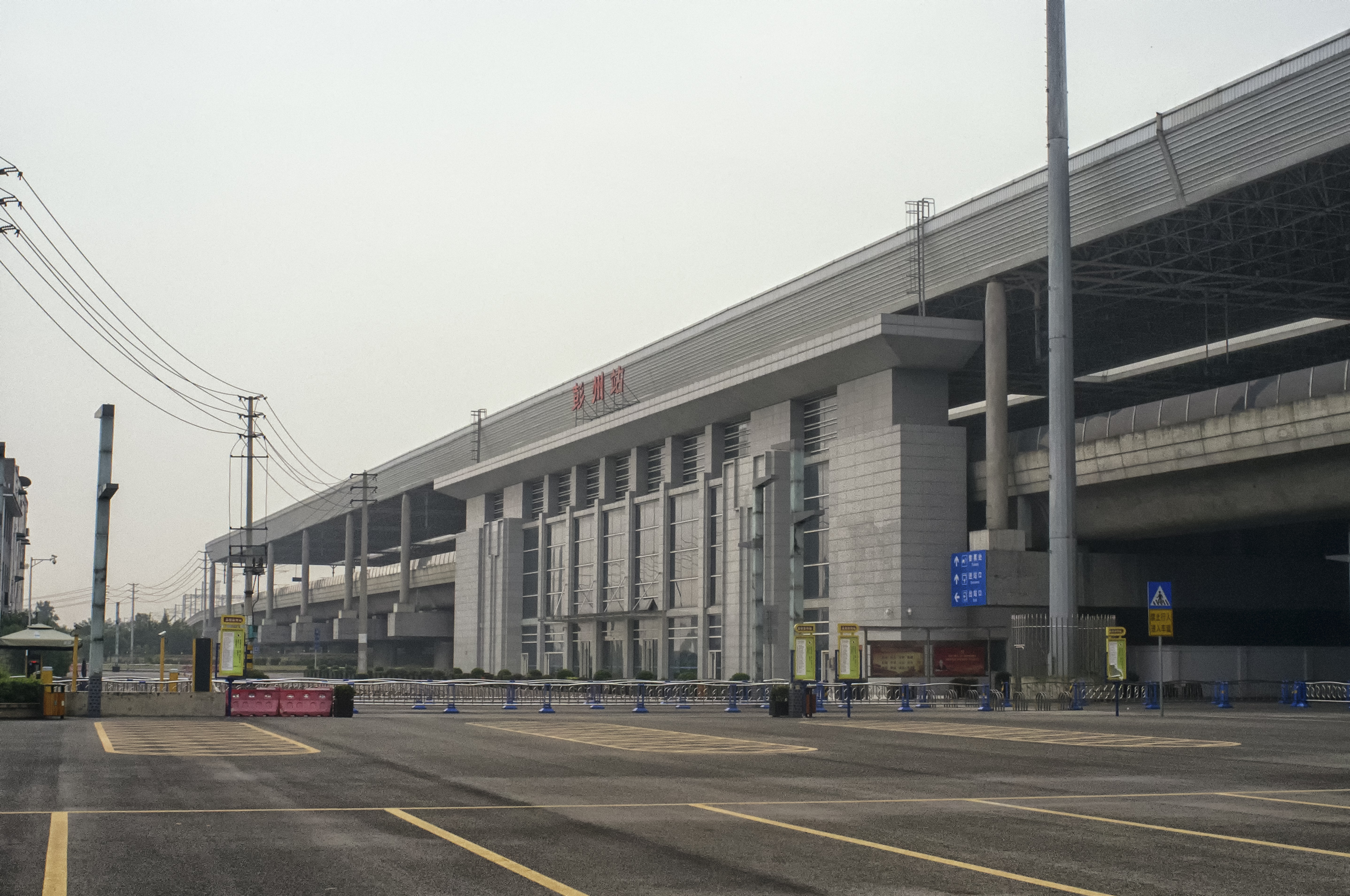 中文（中国大陆）: 国铁彭州站